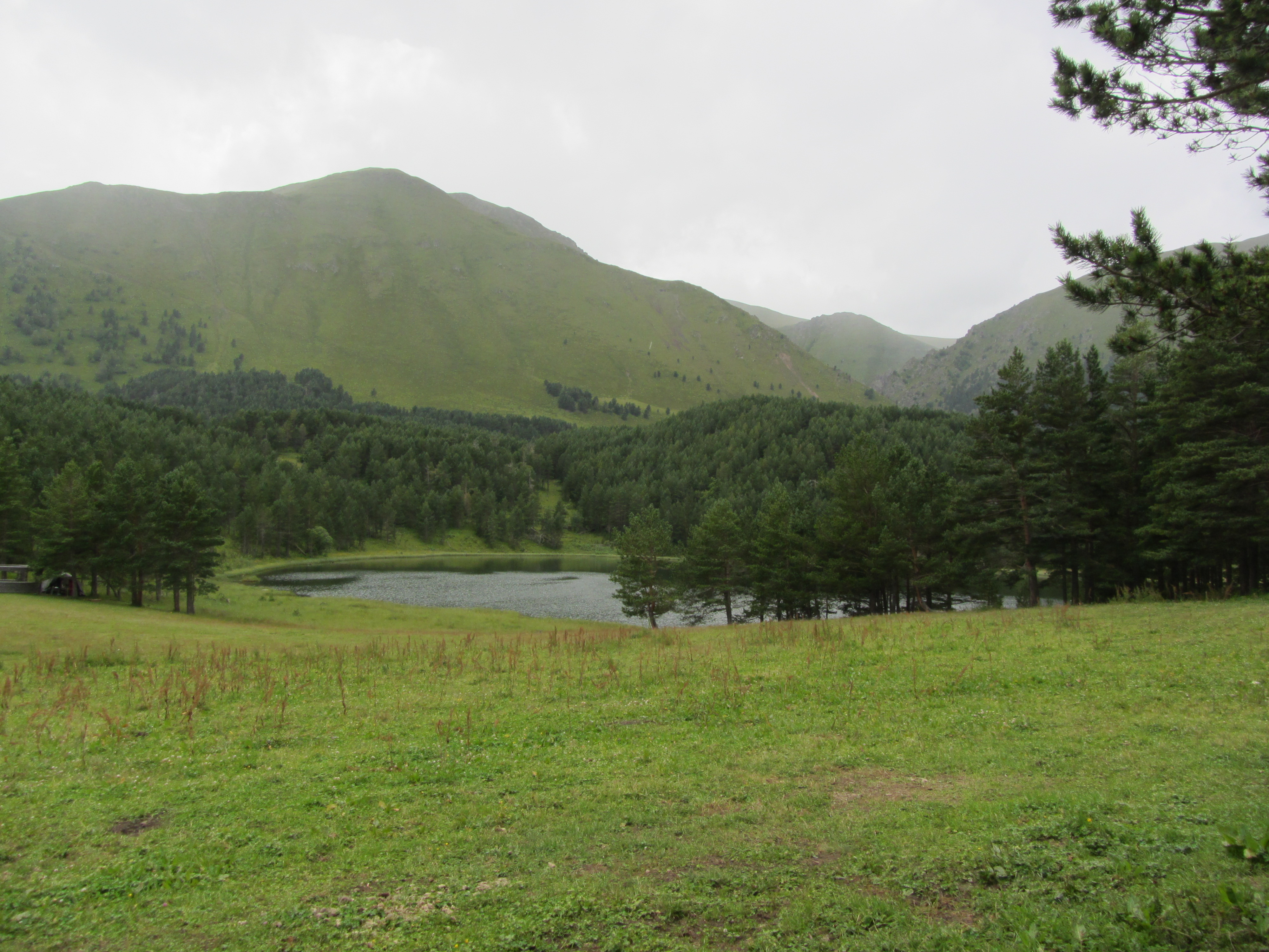 Озеро Хурла-Кель, Карачаевский район This image is related to the protected area of Russia number 0910034